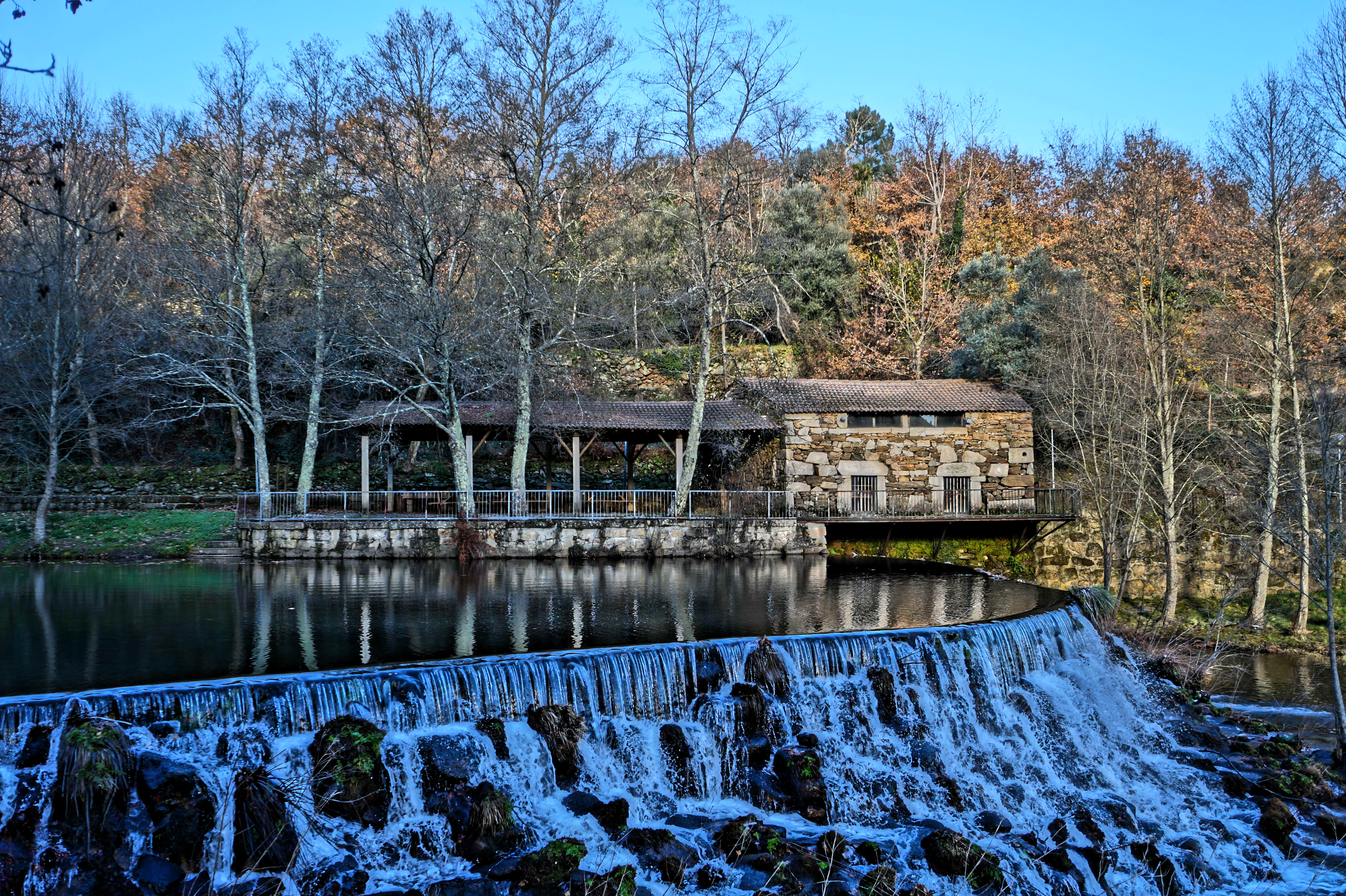 Azenha junto ao rio Louredo